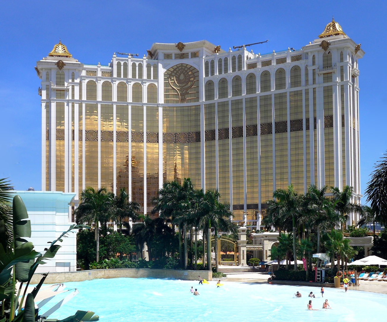 Galaxy Macau Hotel Phase 2